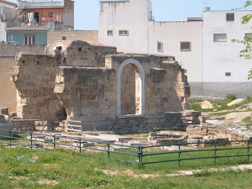 Battistero di San Giovanni. 2007